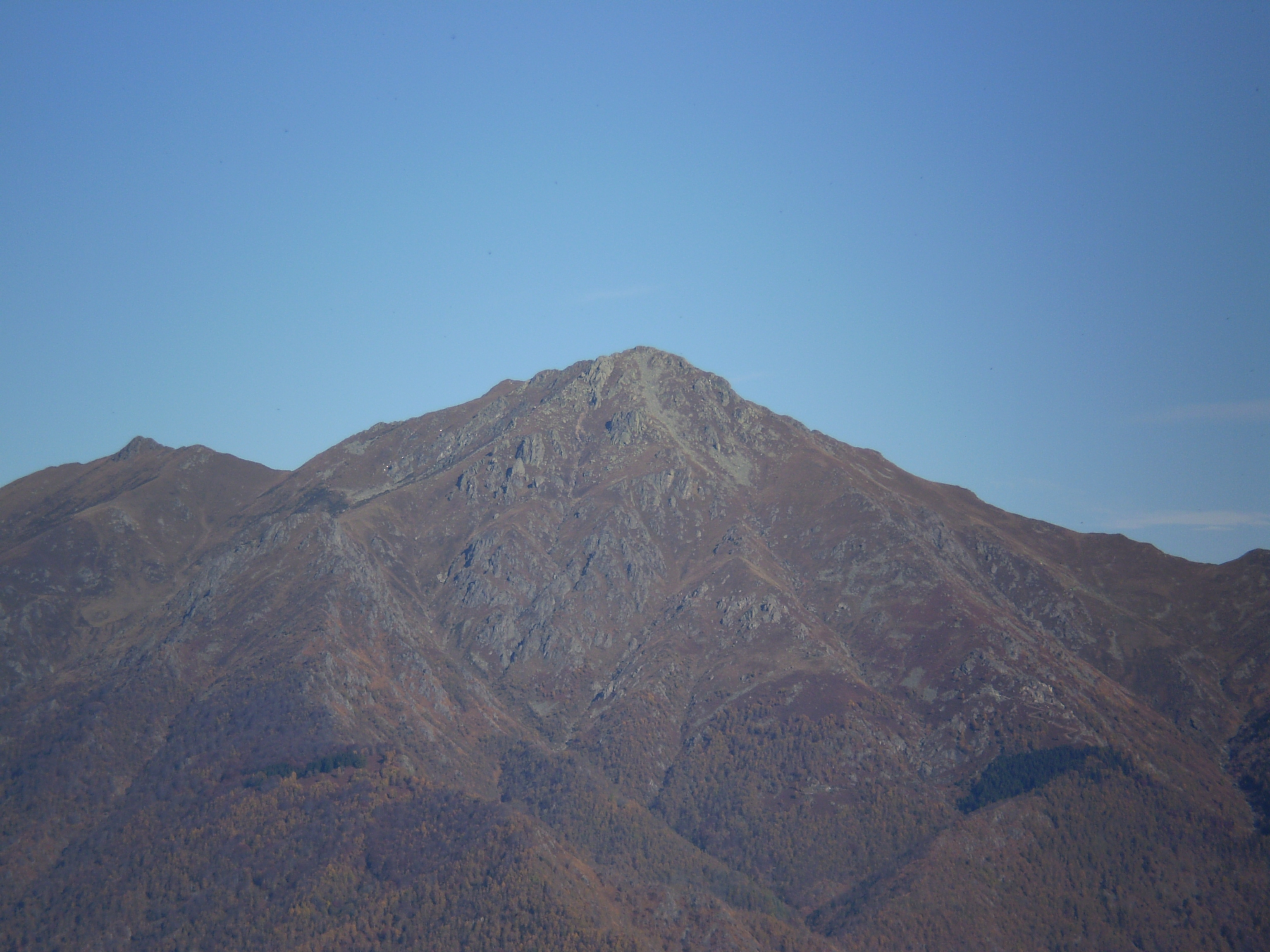 Il Monte Barone visto dal Rifugio Scout di Bielmonte